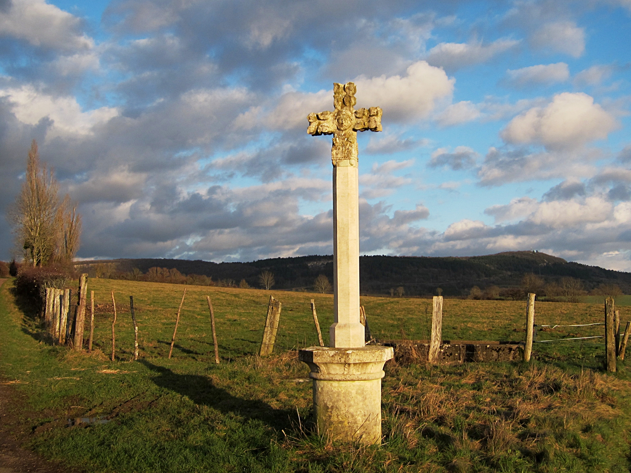 Le calvaire de Savigny-sous-Mâlain (Côte-d'Or).